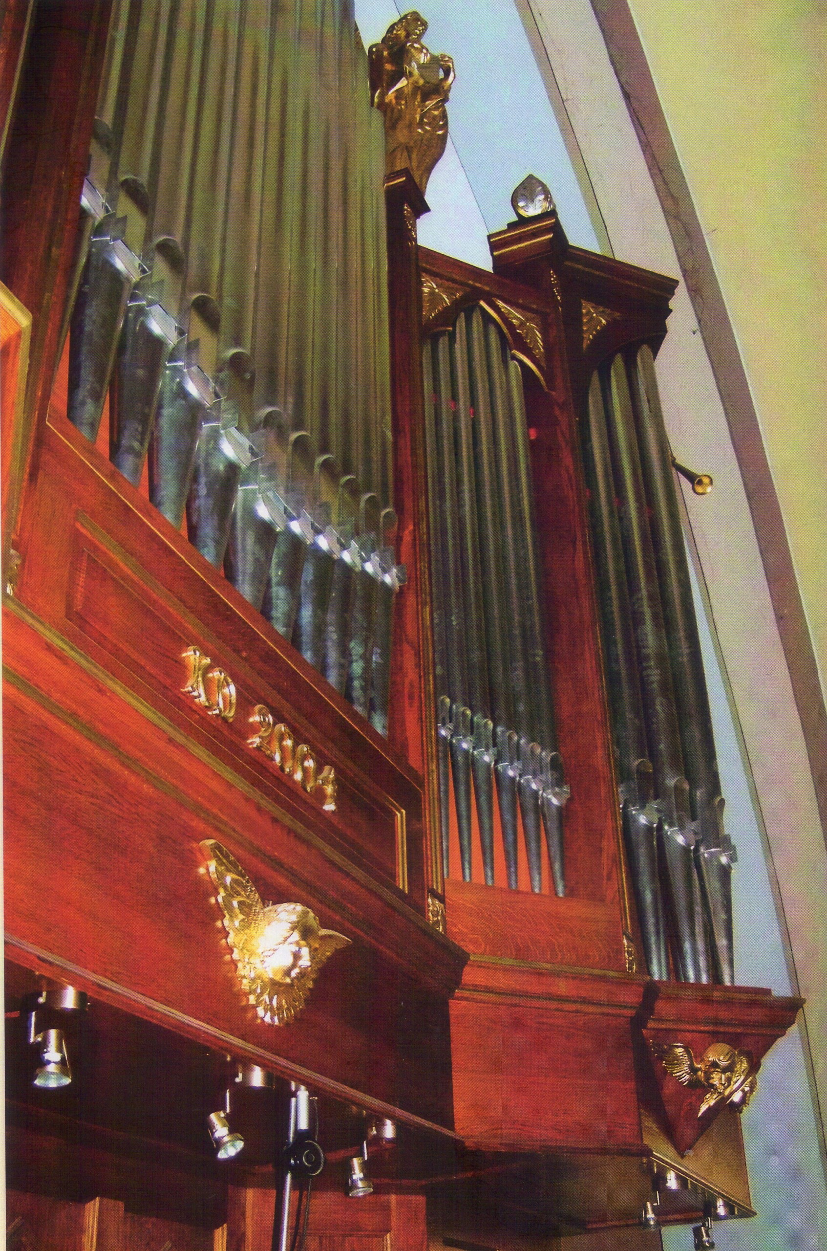 Organy z 2004 roku